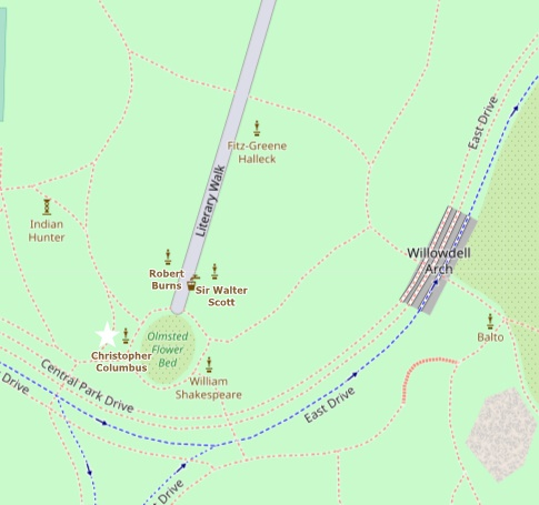 Cristóbal Colón en Central Park. Nueva York. Estados Unidos. This map may be incomplete, and may contain errors. Don't rely solely on it for navigation.